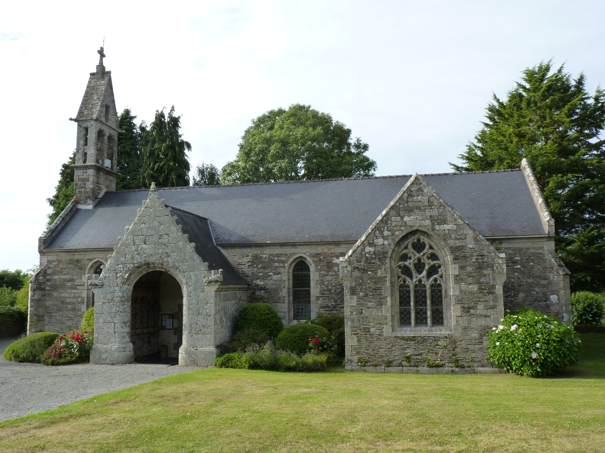 Église du 16ème siècle.